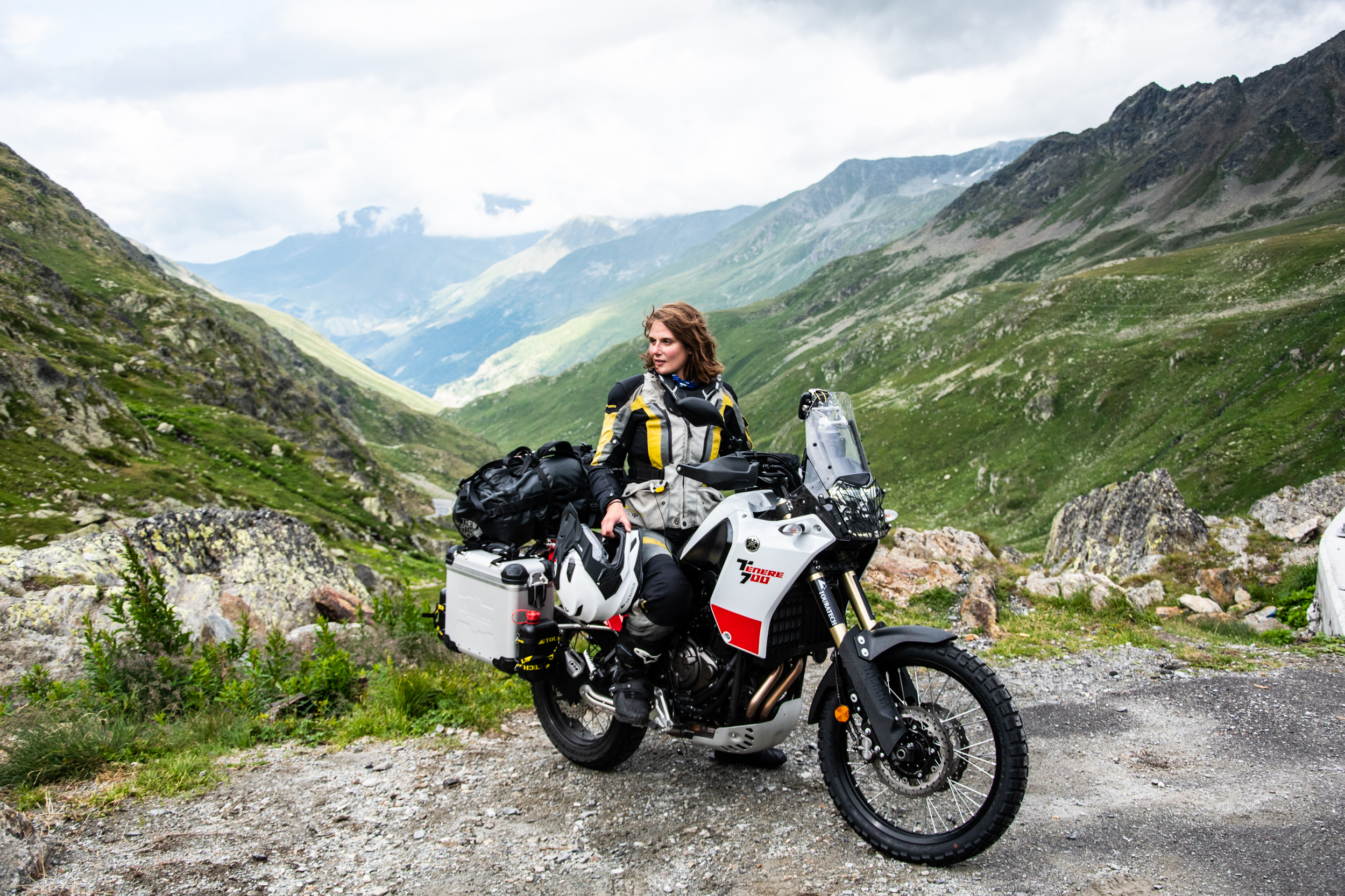 Motorrad, Lea Rieck, Abenteuer, Motorradreise